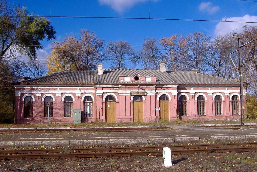 Dworzec kolejowy w Mordach.